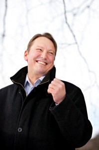 Mats Nylund